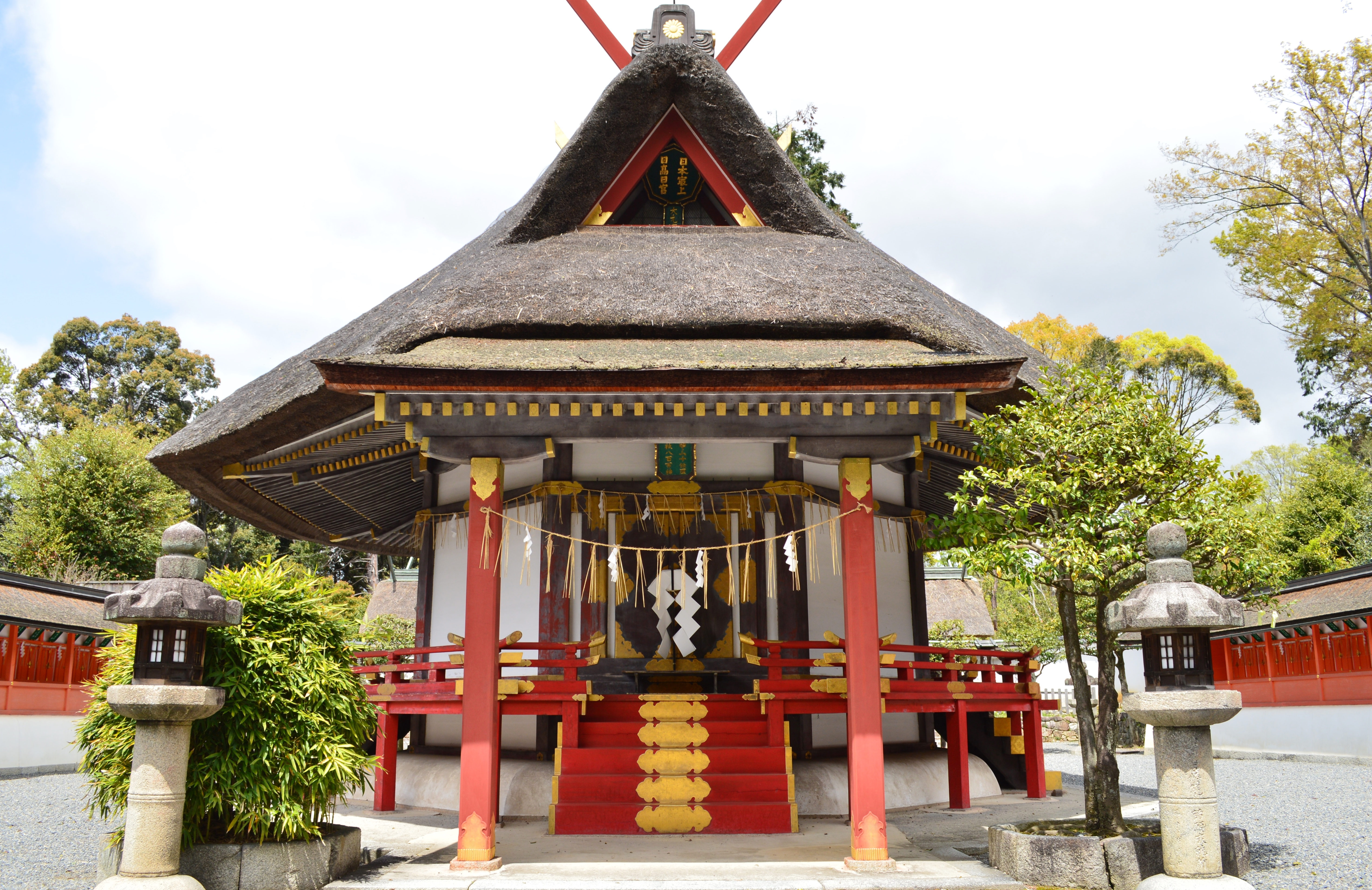 吉田神社 (京都市) 斎場所大元宮 社殿 Nikon D3200